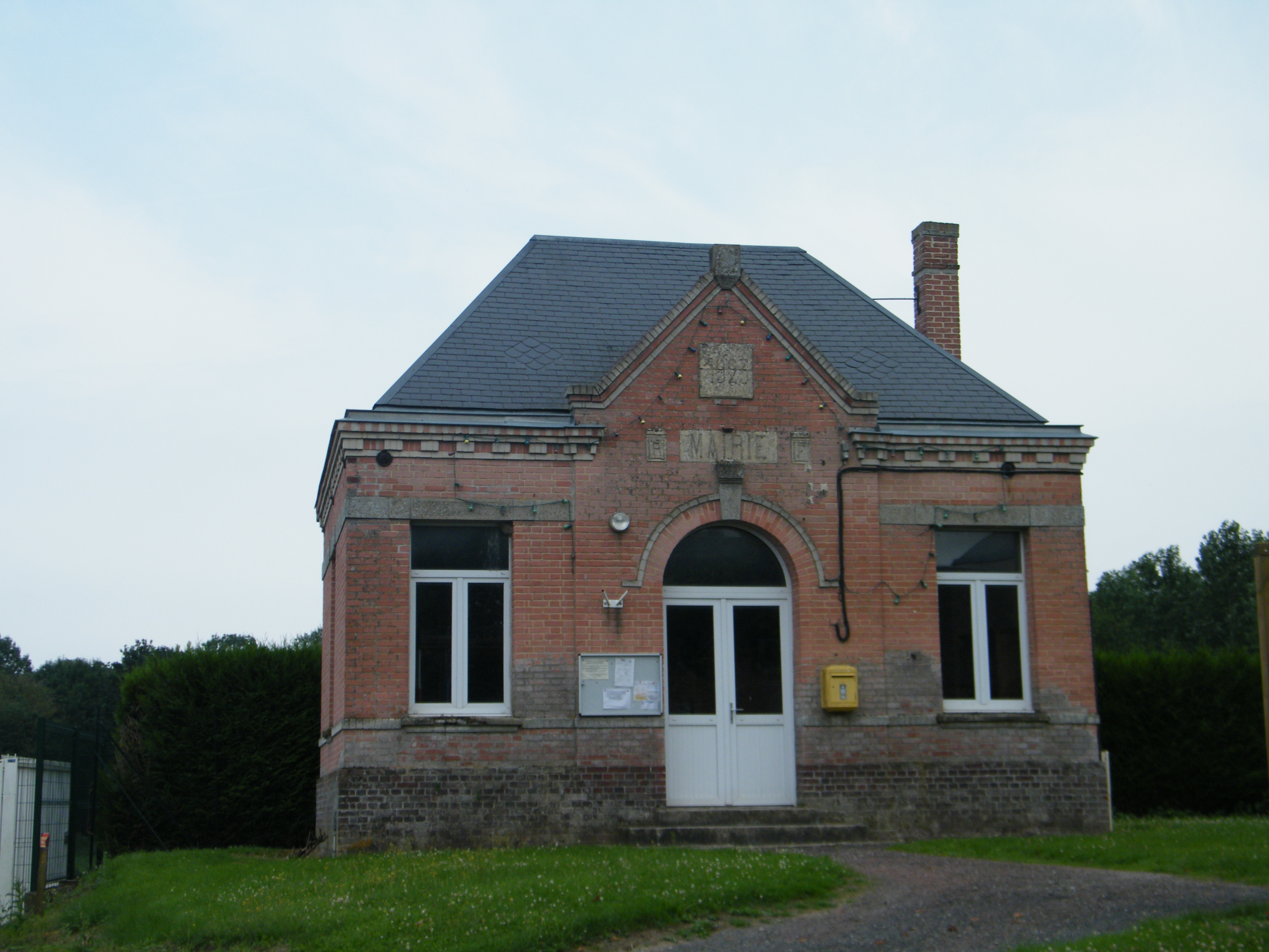 Mairie.